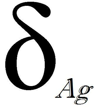 האות דלתא עבור יחס הכסף